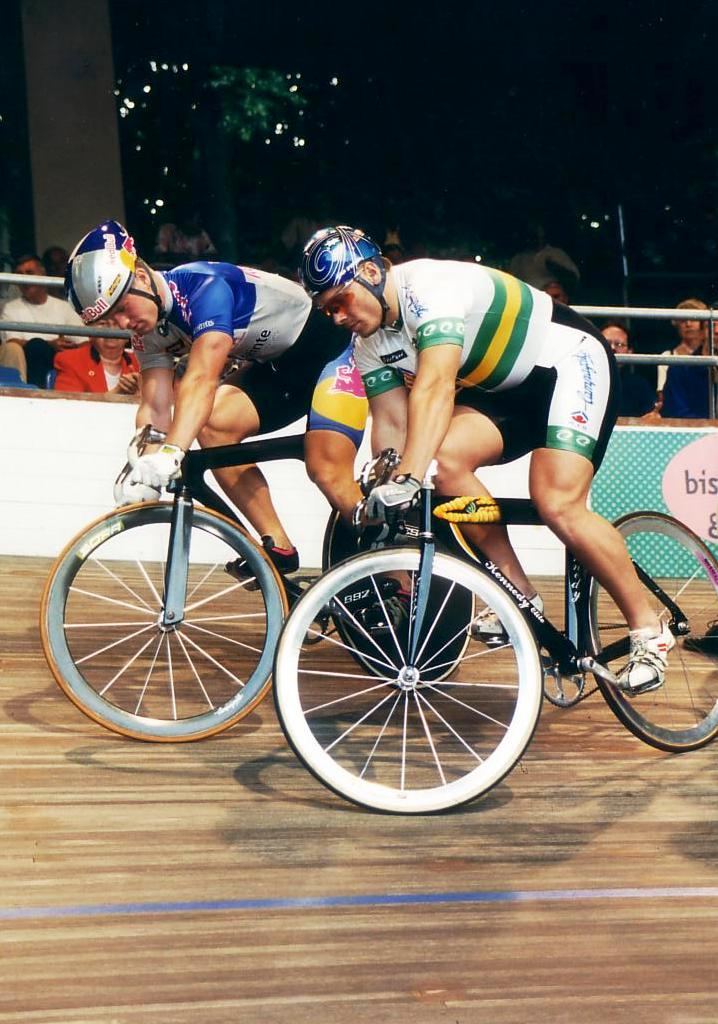 Jan van Eijden (l.), deutscher Radsportler, Darryn Hill, australischer Radsportler